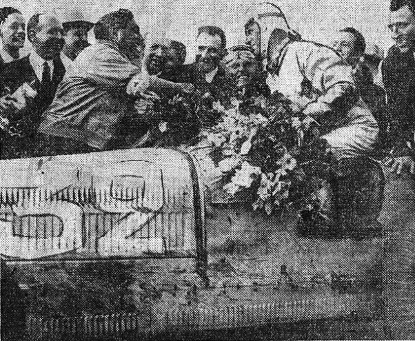 Chiron vainqueur du GP de France 1931, félicité par Campari (au centre Viarzi, sur les fleurs).